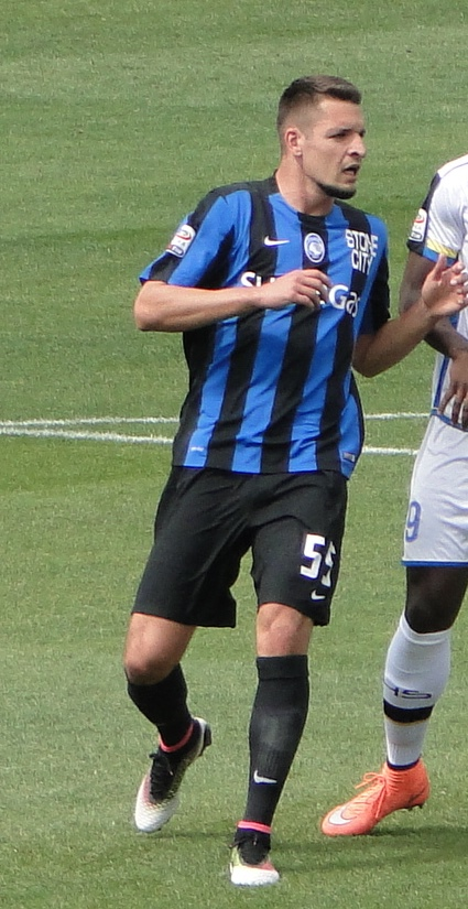 Berat Djimsiti, calciatore albanese